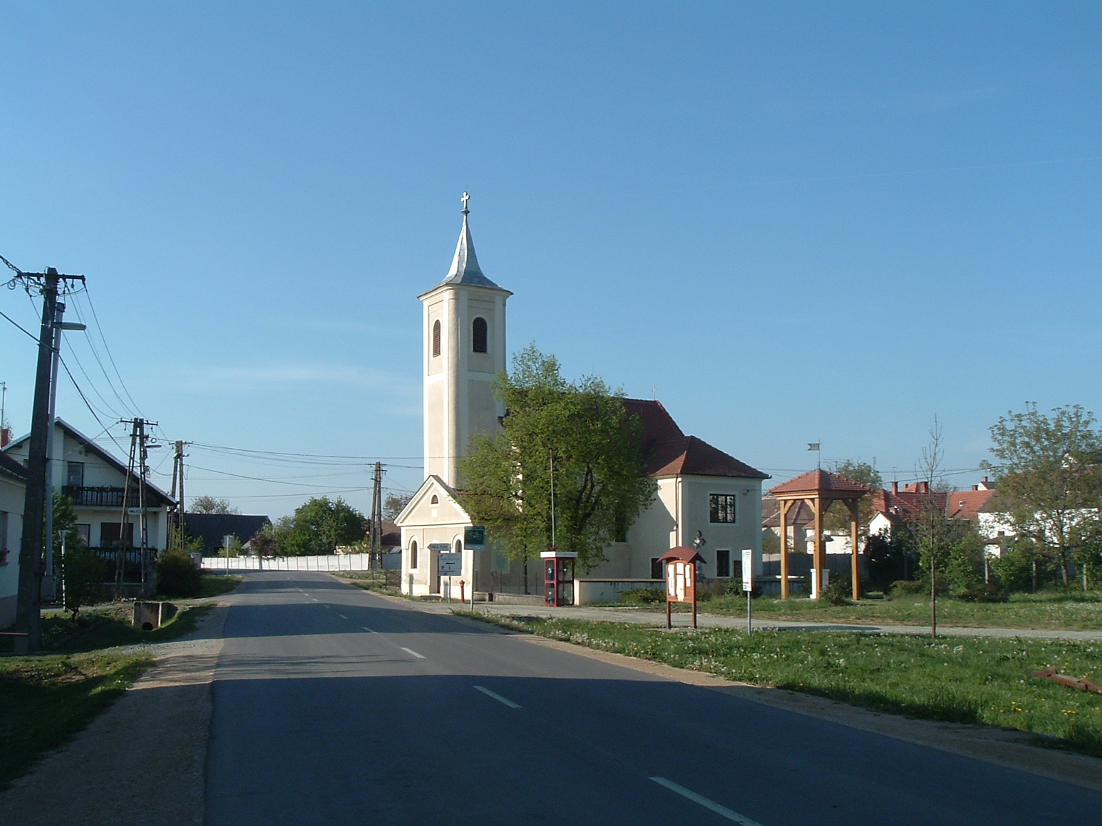 Horvátlövő, Szent Anna római katolikus templom